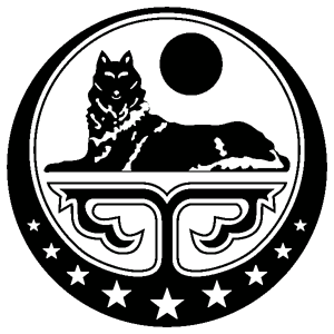 Герб Чеченской Республики Ичкерия